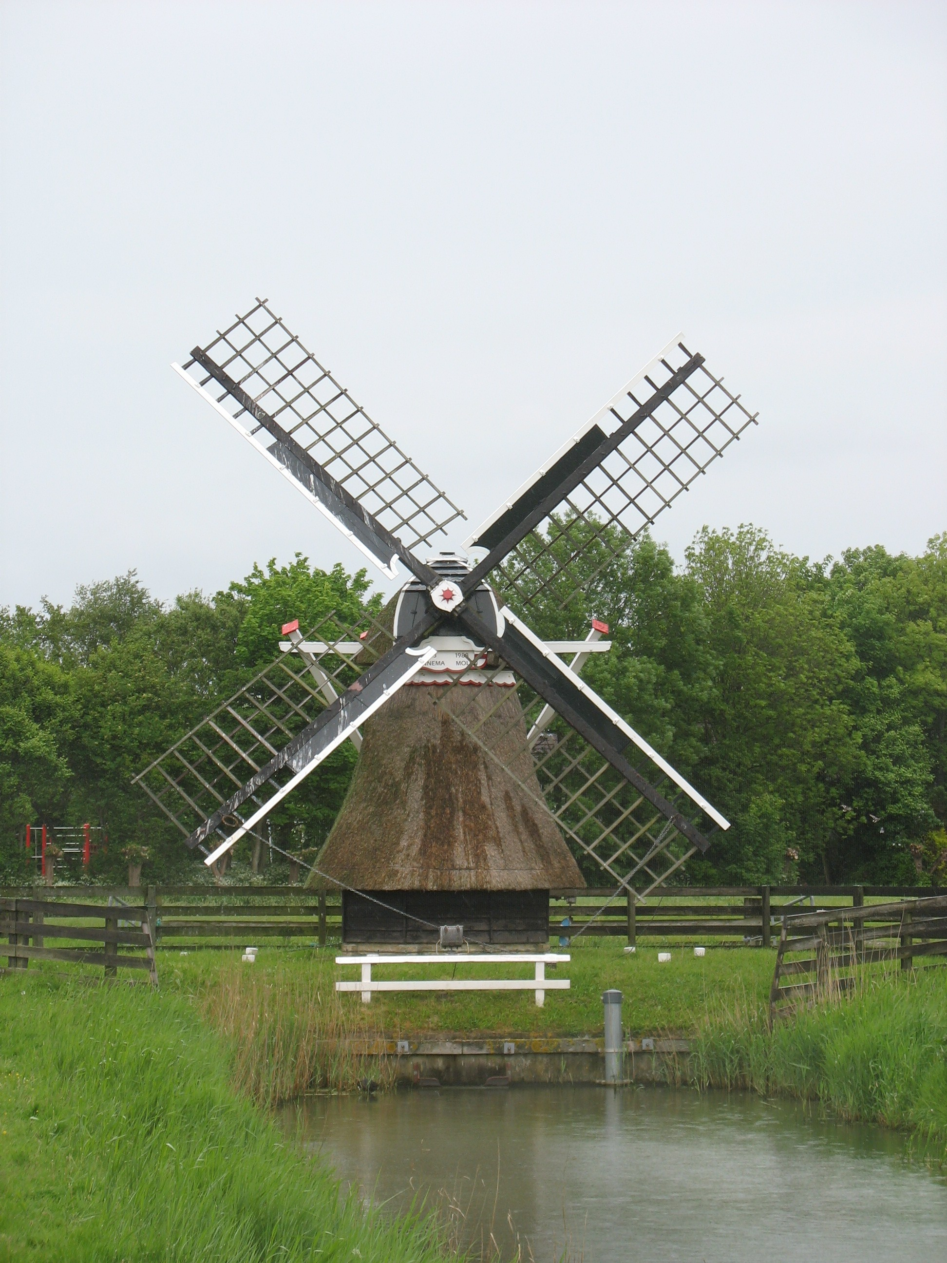 Binnenmasmolen/kleine molen te Stiens